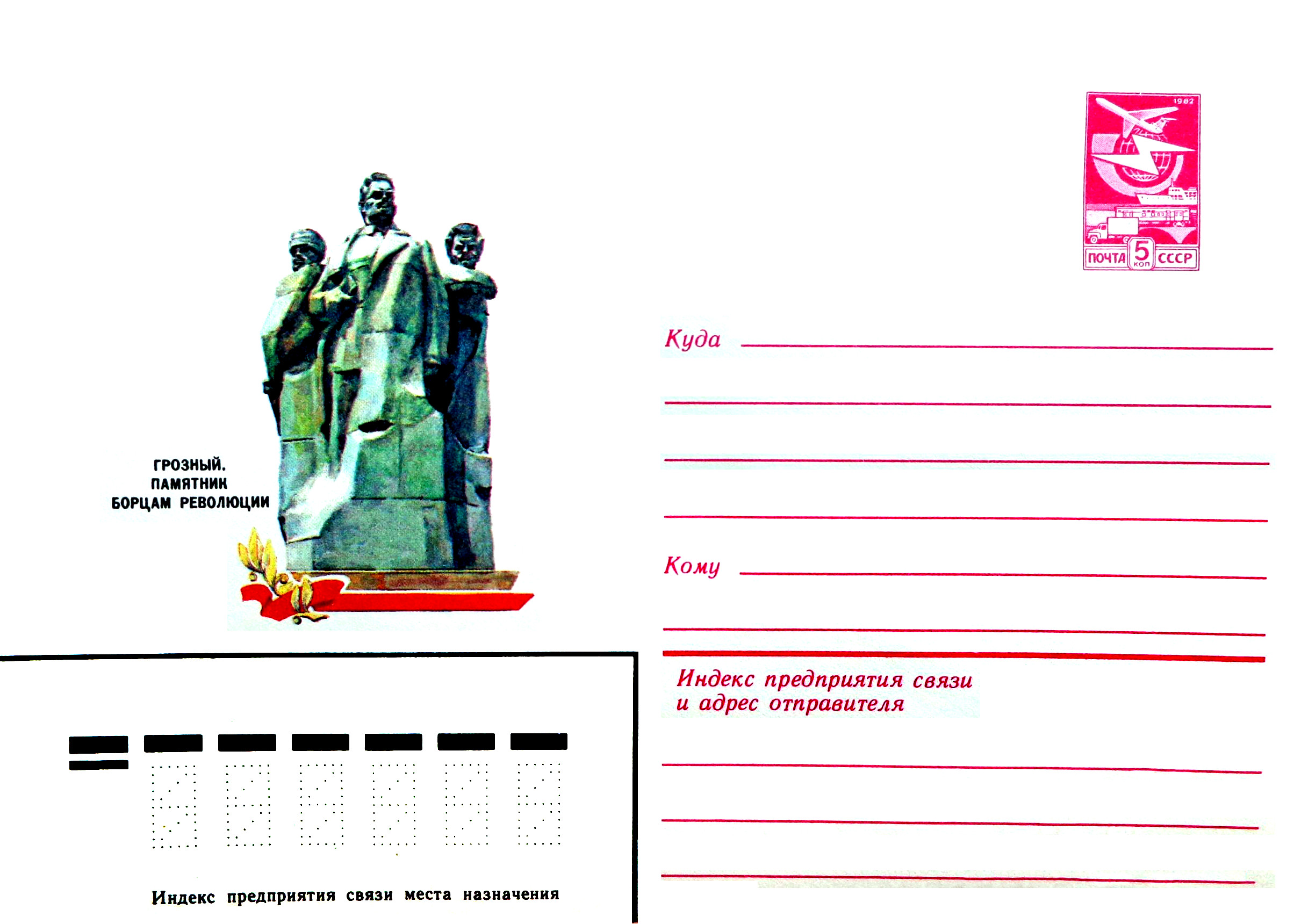 Конверт СССР 1983 года. Памятник борцам революции